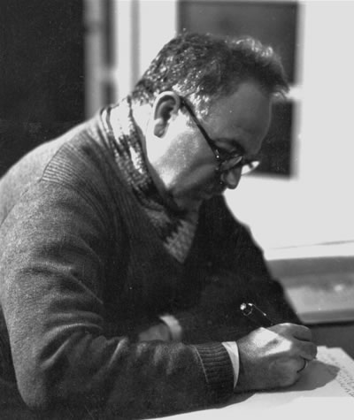 محمد لطفي جمعة